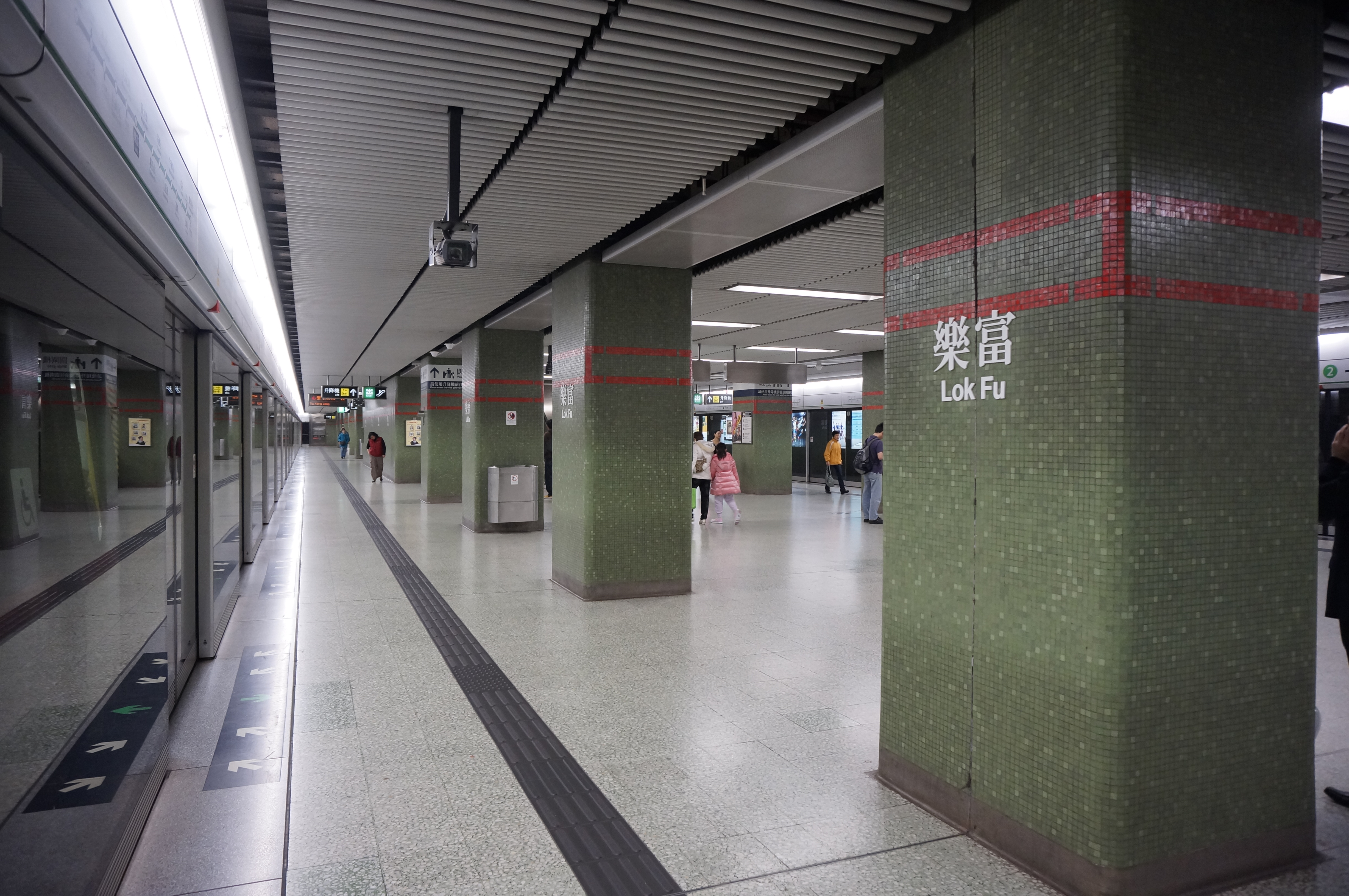 港鐵樂富站月台